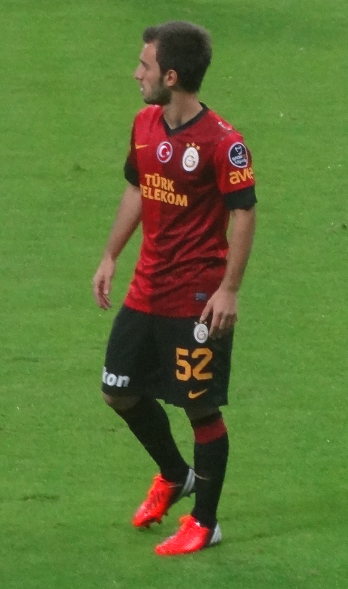 Emre Çolak in Bursaspor match